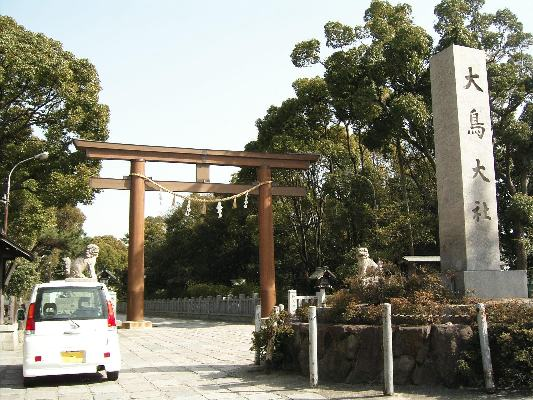 大鳥神社の鳥居。